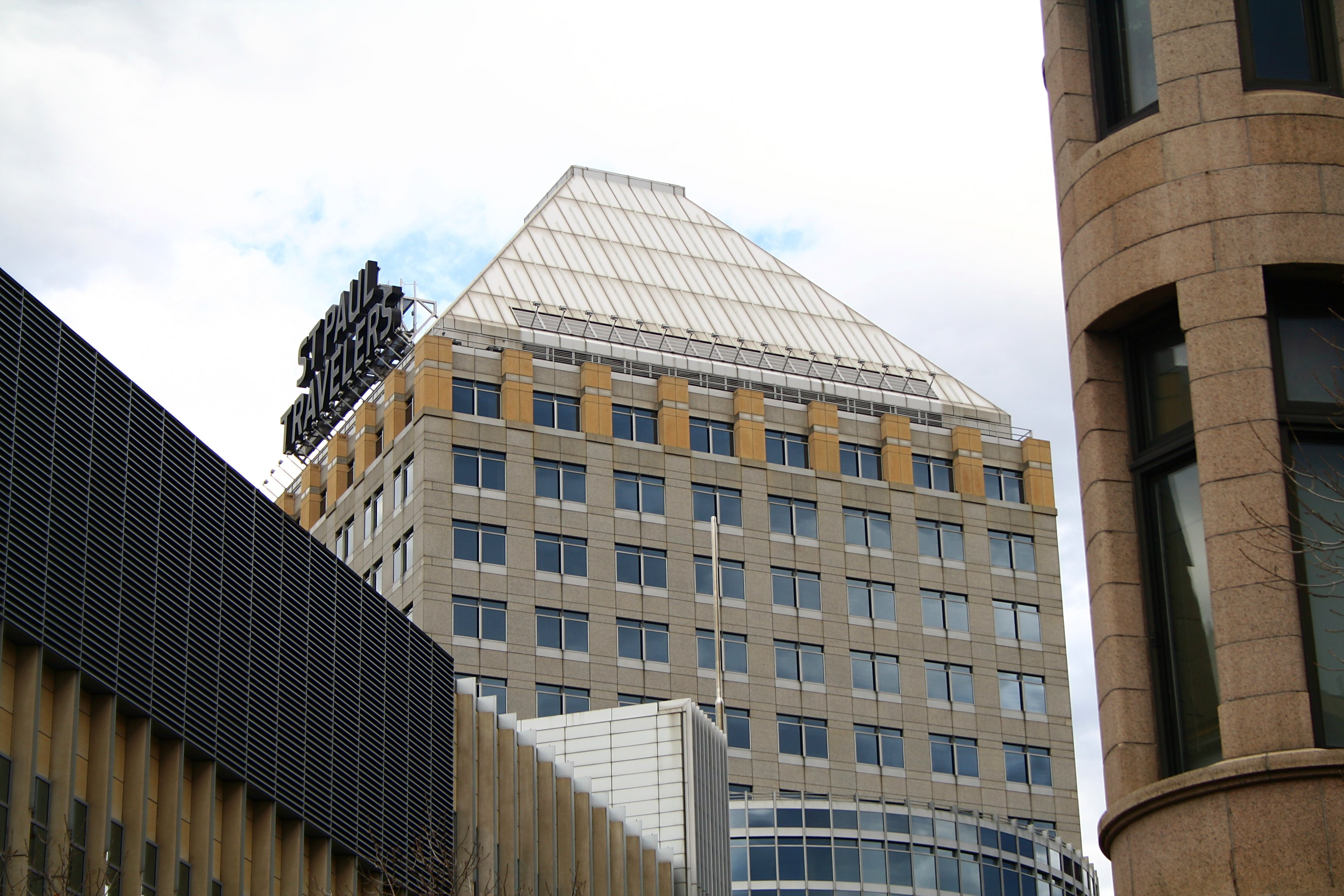 Travelers Companies, Saint Paul, Minnesota